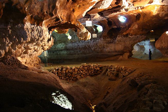 Katalekhor cave in Zanjan